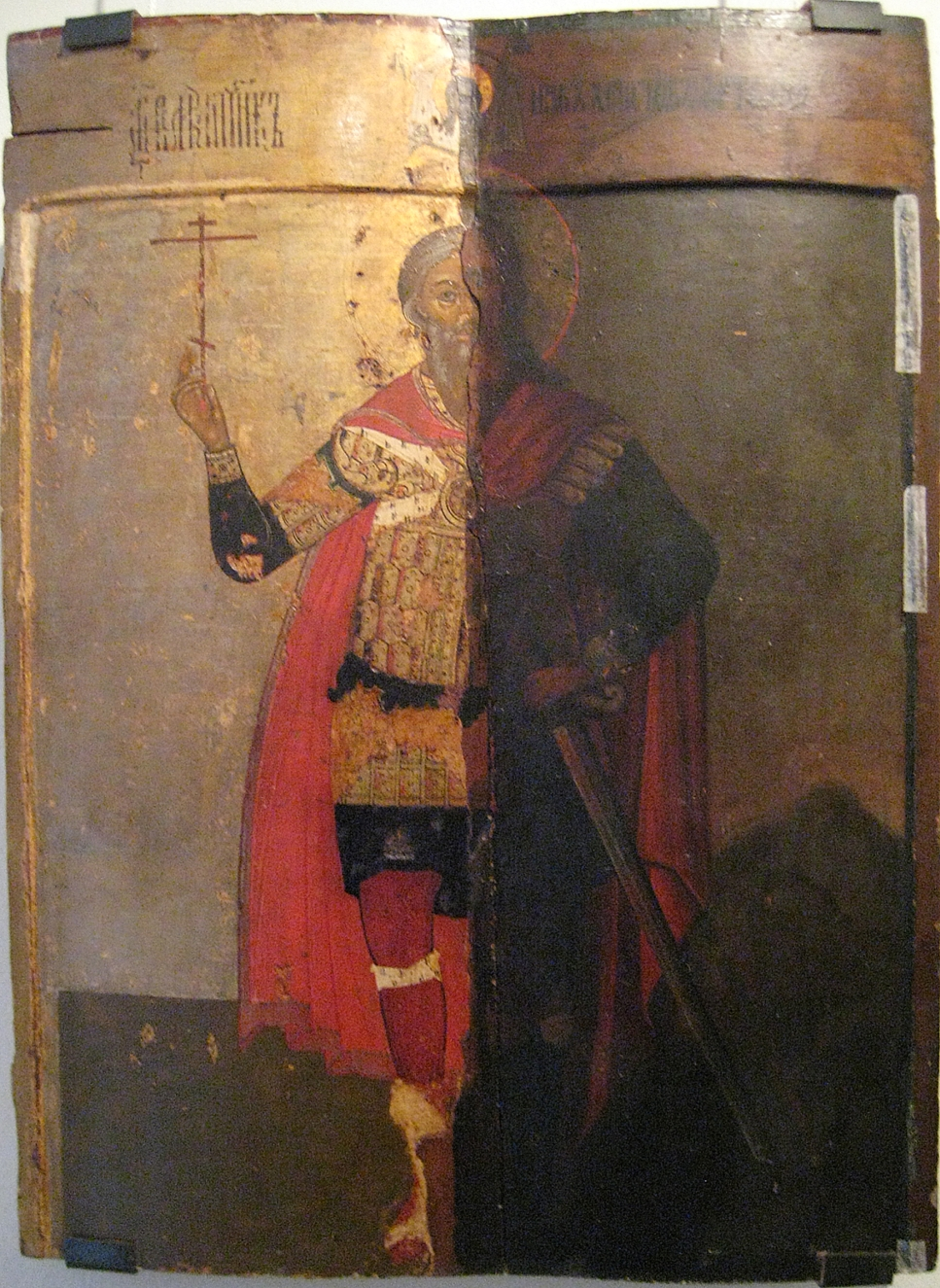 Артемий Великомученик. Живопись справа - под слоем потемневшей олифы. 17 век (правая половина - запись 19 века/ Нижегородский государственный художественный музей. St. Artemius the Martyr. Icon of 17 c (right side - 19с). Half of icon was left without clearing to show how drying oil become dark during ages/ The Nixhny Novgorod Art Museum